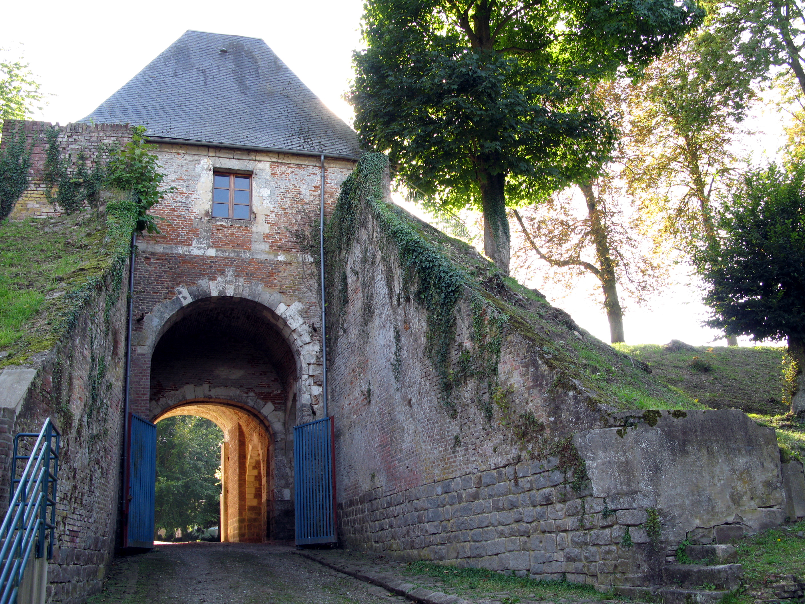 Doullens (Somme, France) - Intérieur de la citadelle. . . .